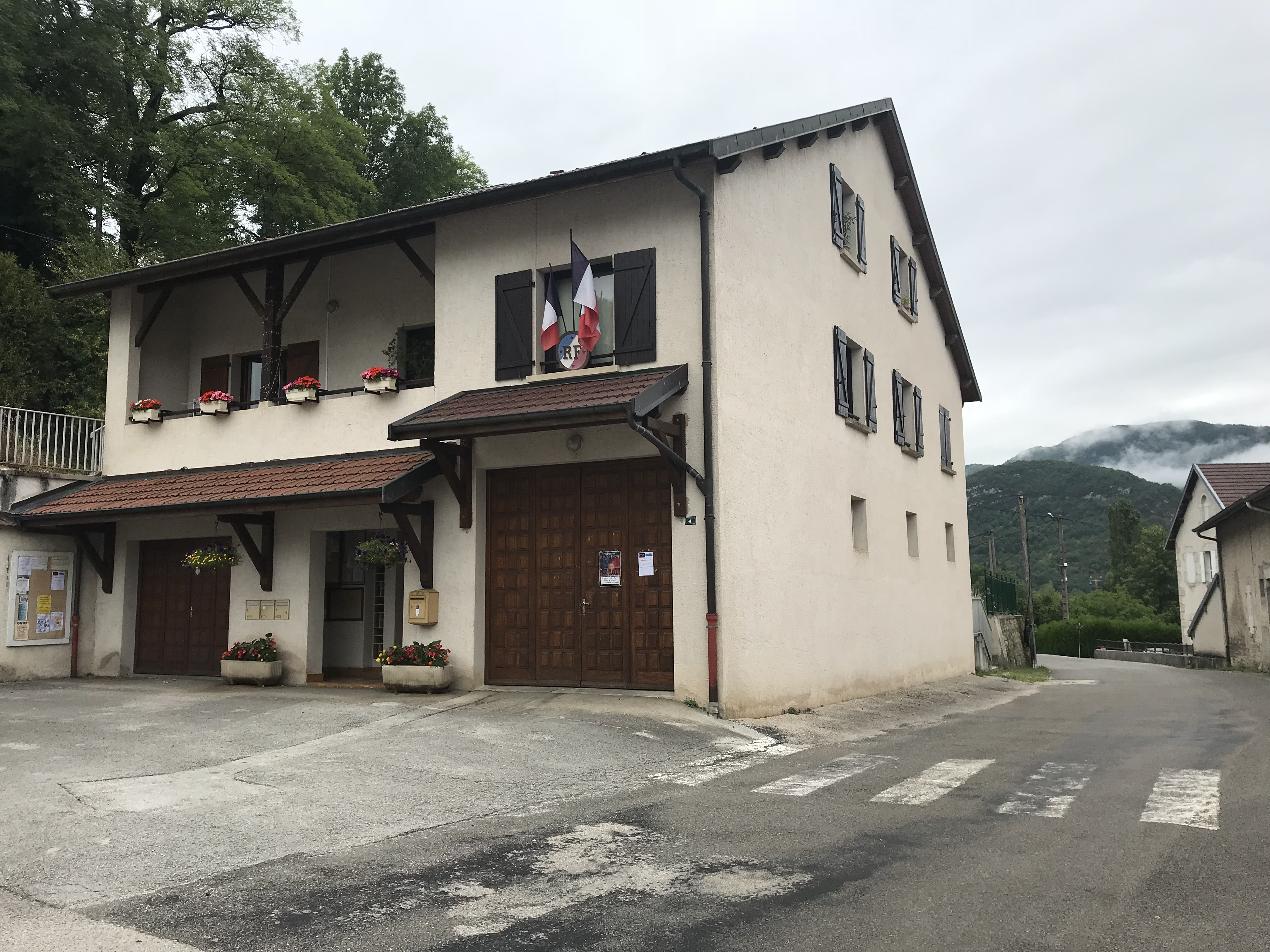 Condes (Jura, France) en juillet 2018.